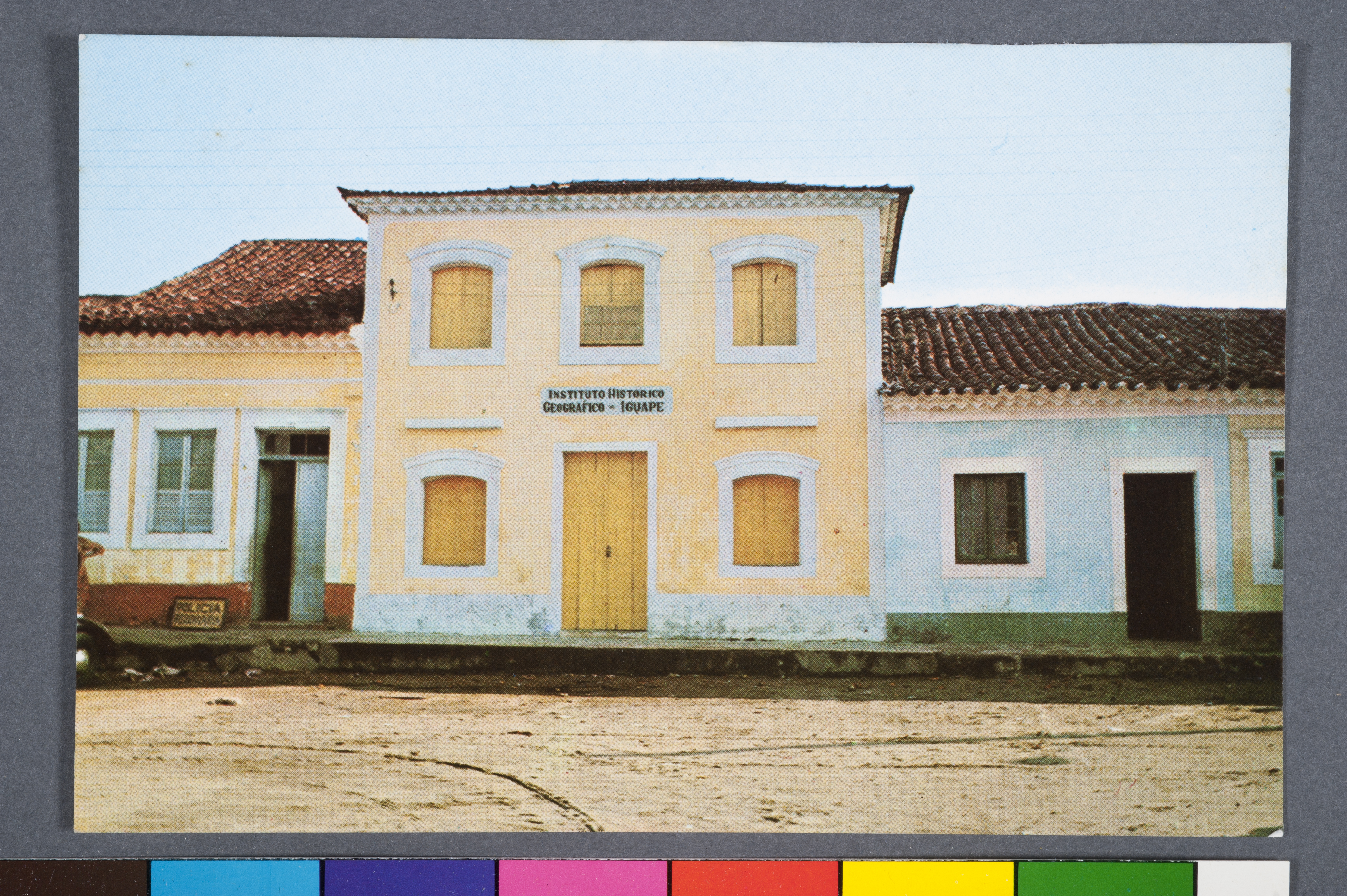 Obra que integra o acervo do Museu Paulista da USP. Coleção João Baptista de Campos Aguirra. Ref. Agente: Folhinhas Scheliga S. A.